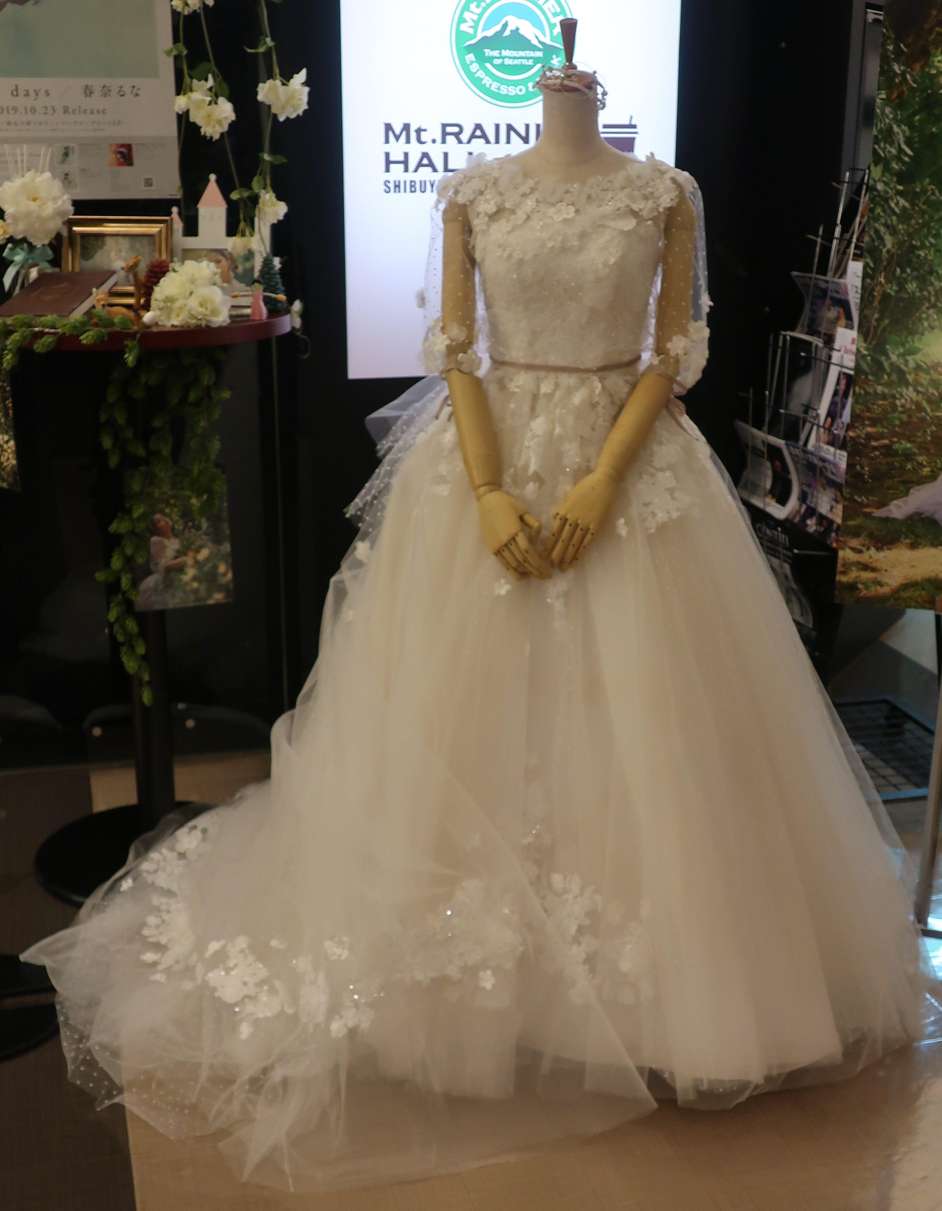 春奈るなデザインプロデュースのウエディングドレスLUNAMARI 第５弾 花の妖精。2019年11月16日 Mt.RAINIER HALL SHIBUYA PLEASURE PLEASURE で撮影